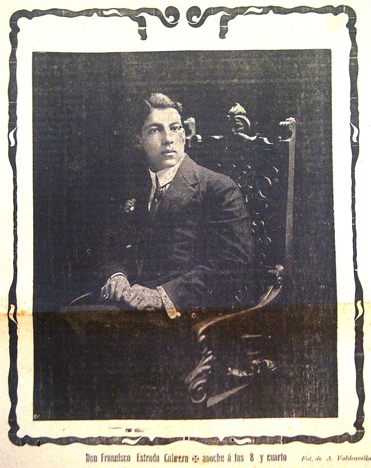 Francisco Cabrera, hijo de Manuel Estrada Cabrera, poco antes de su muerte.